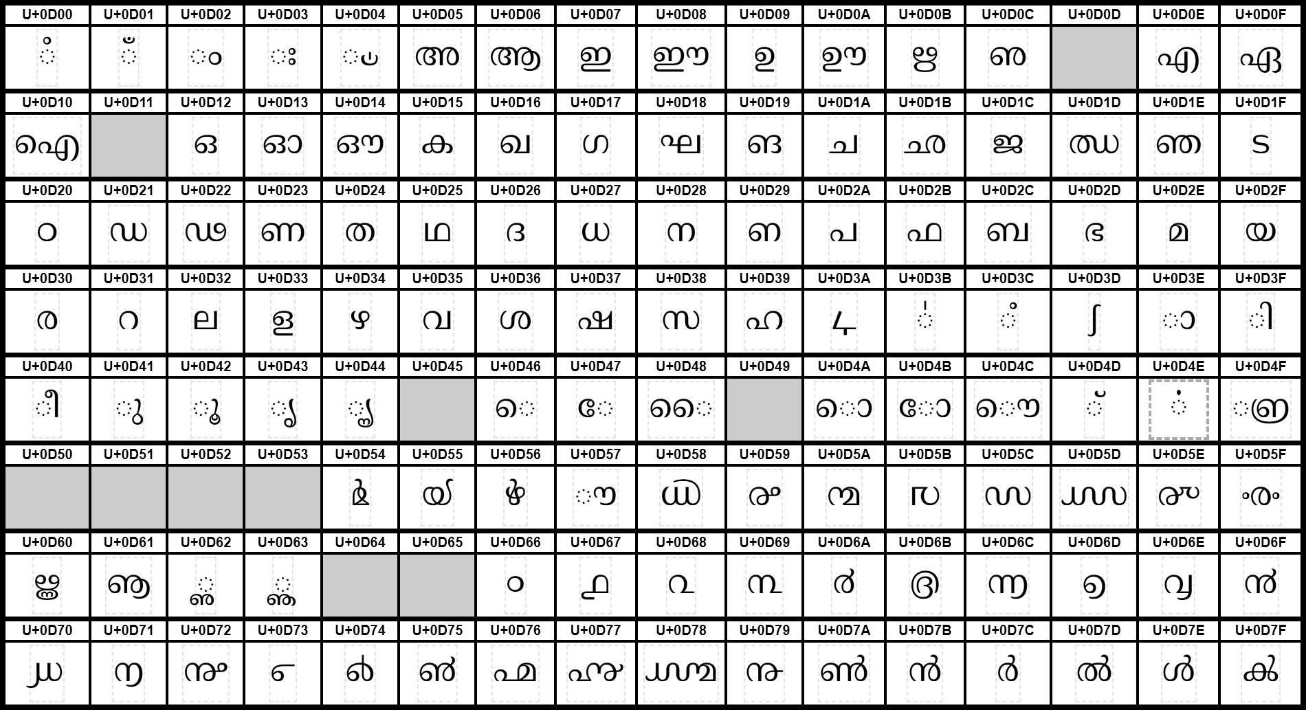 Grafiktafel für den Unicodeblock Malayalam. Schraffierte Felder sind unbesetzte Codepoints.